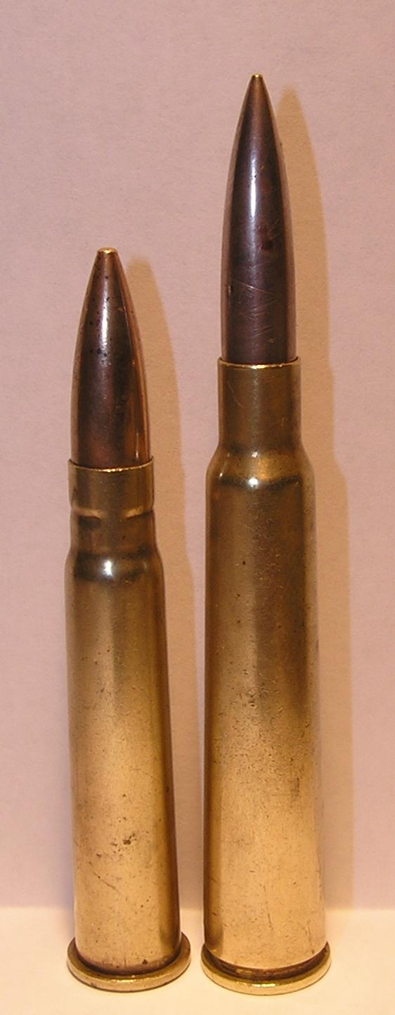 Kalashnikov 15:50, 7 September 2007 (UTC)303 British besides .280 Ross